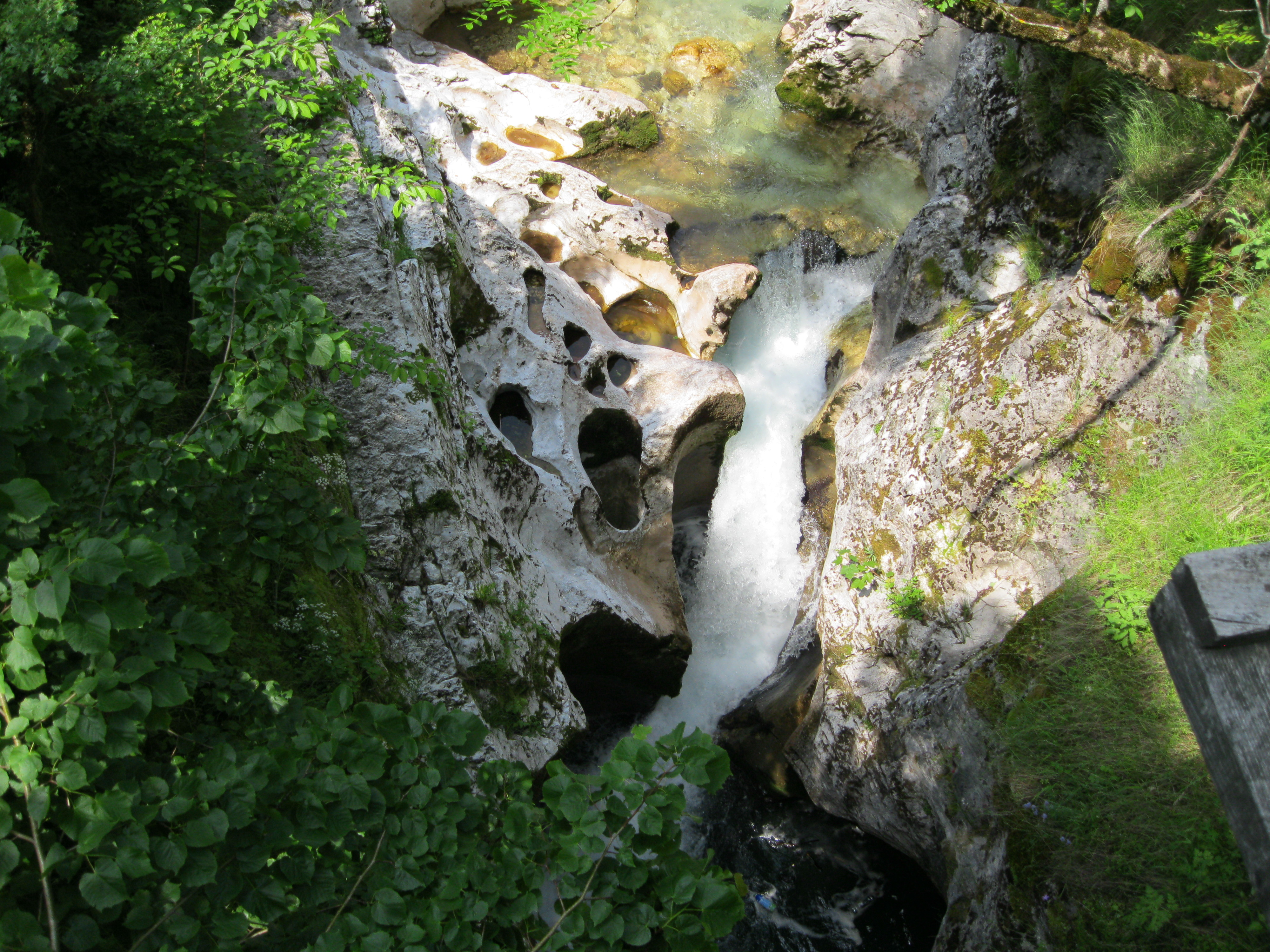 Казани –Трново У јужном дијелу међупланинског простора Општине Трново смјештена је планина Трескавица .У њеном подножју, а изнад села Турови састају се Годињски и Храстнички поток, и тако настаје ријека Жељезница, симбол Трнова и цијелог простора кроз који протиче све до њеног ушћа у ријеку Босну. Недалеко од свог настанка Жељезница наилази на кречњачку греду у којој је током дужег времена удубила своје корито дубоко десетак метара, широко два и дуго 150 метара.Кроз тај казан вода се мукотрпно пробија: час избија, час пјени, час кључа, баш као у неком великом казану на ватри и због ове необичне појаве људи су ово мјесто назвали- Казани.На овом мјесту сваки посјетилац се диви необичној слици коју је плаховита планинска вода направила у станцу кречњаку.Корито Казана је бијело, углачано, пуно џиновских лонаца и брзака. PPP022